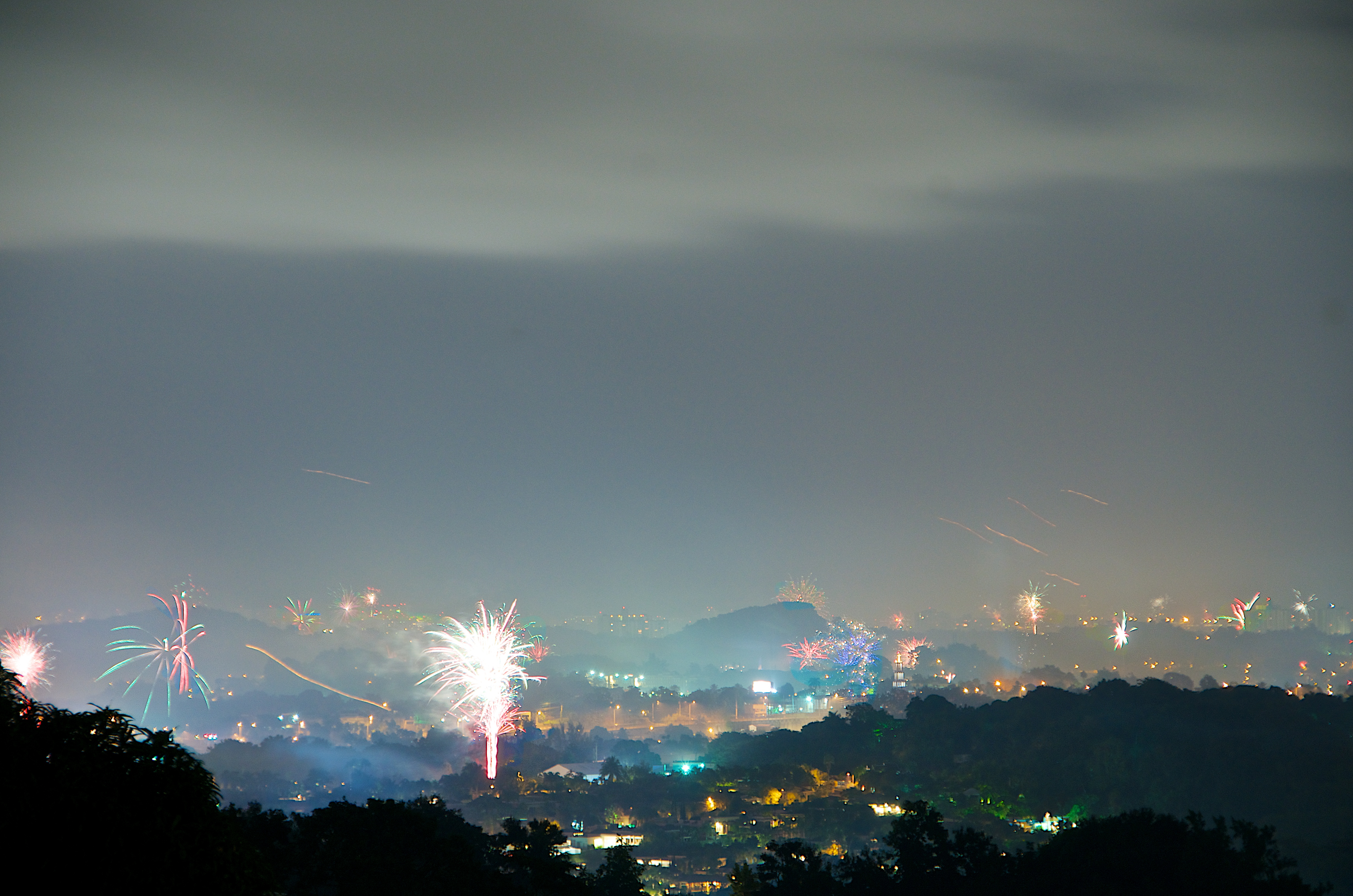 Caimito, San Juan, Puerto Rico